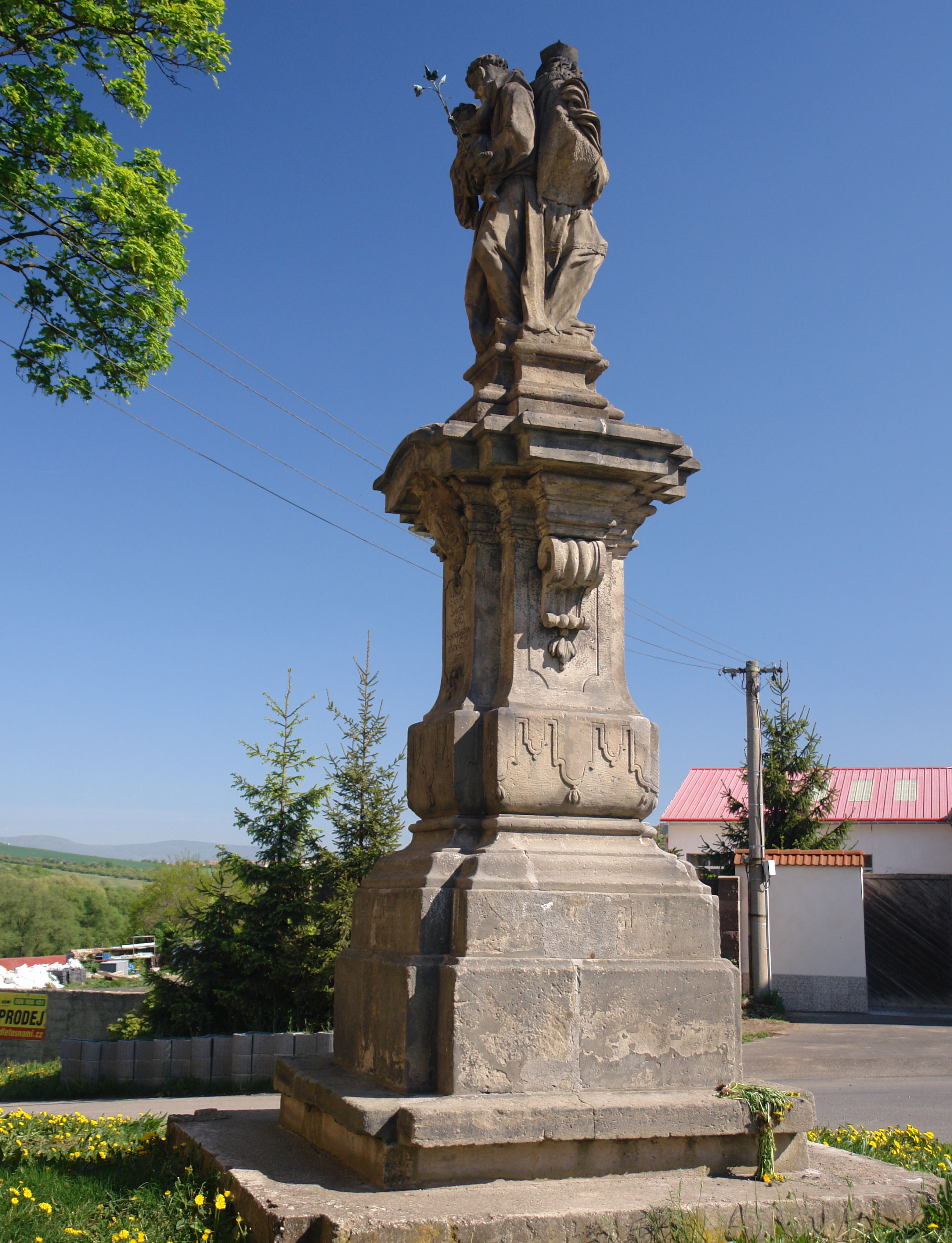 Sochy sv. Antonína a sv. Jana Nepomuckého (České Zlatníky), V od kostela, České Zlatníky